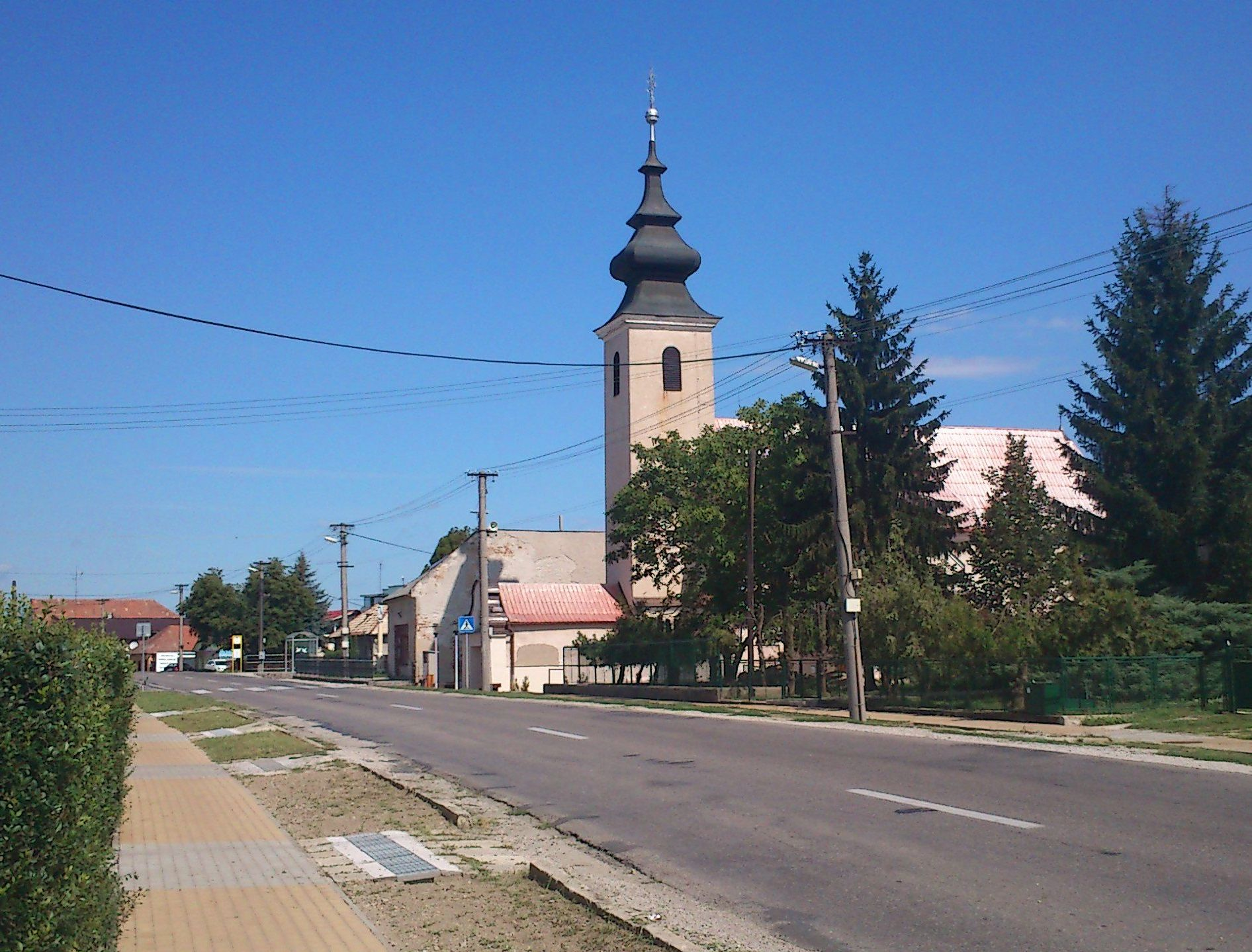 Kostol v obci Zbehy